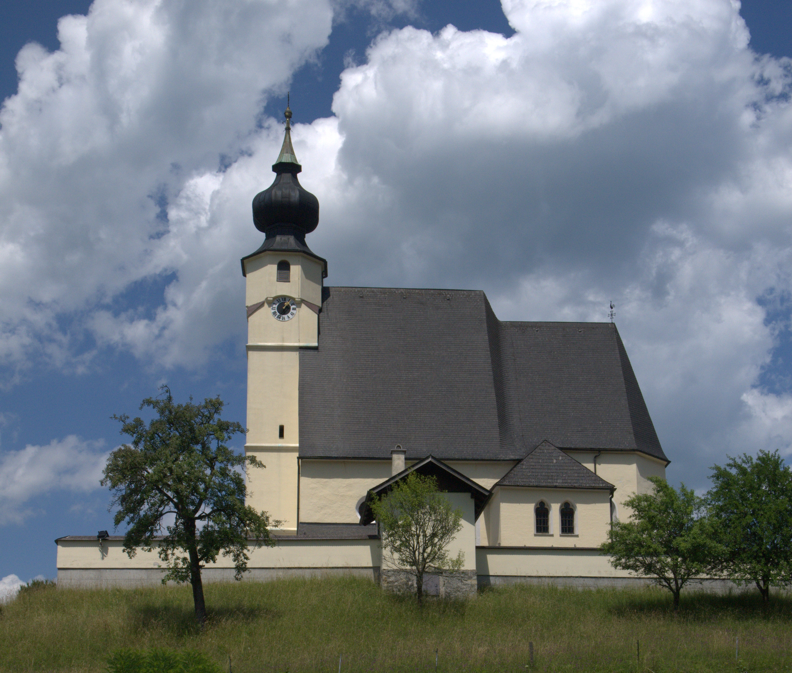 Kath. Pfarrkirche hl. Andreas mit Friedhof